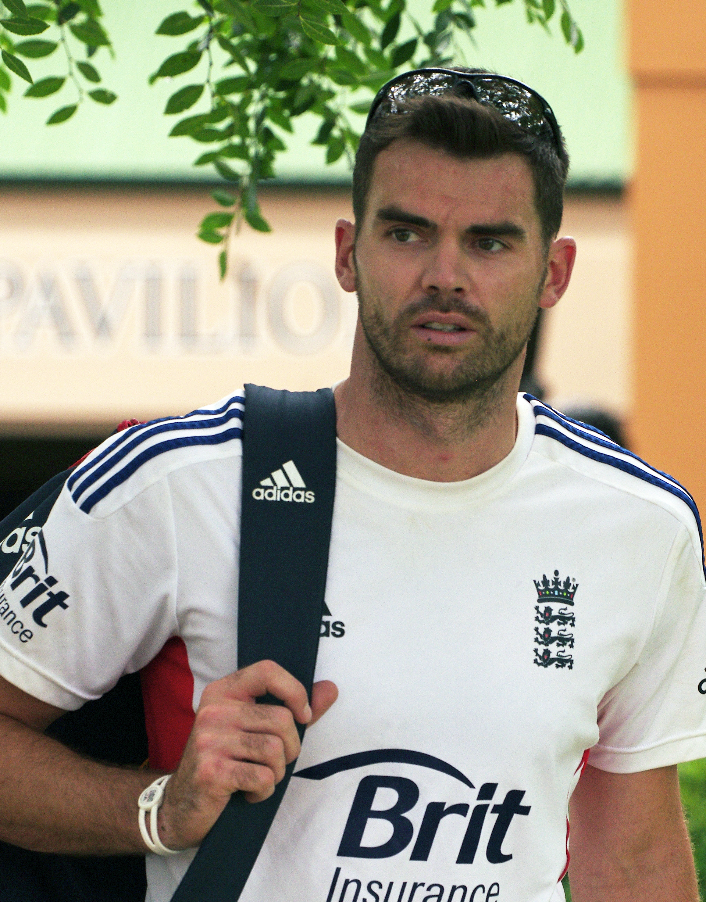 JIMMY ANDERSON